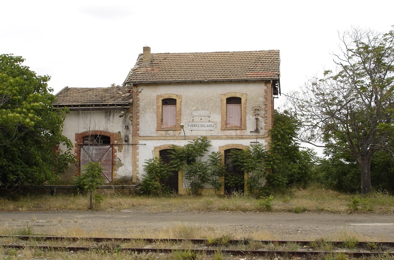 Antiguo apeadero ferroviario de Fuente del Arco.